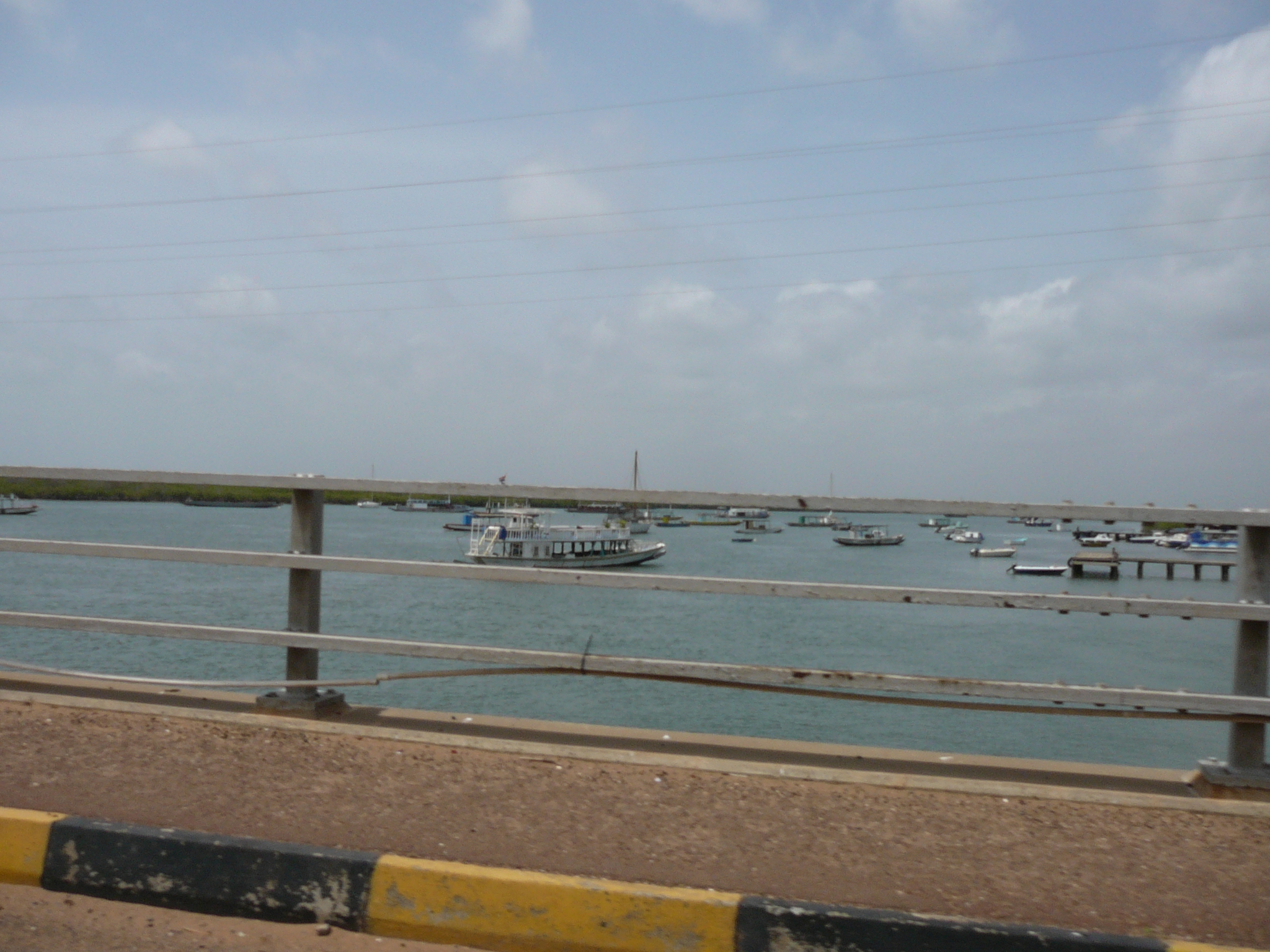 Oyster Creek von der Denton Bridge, Gambia